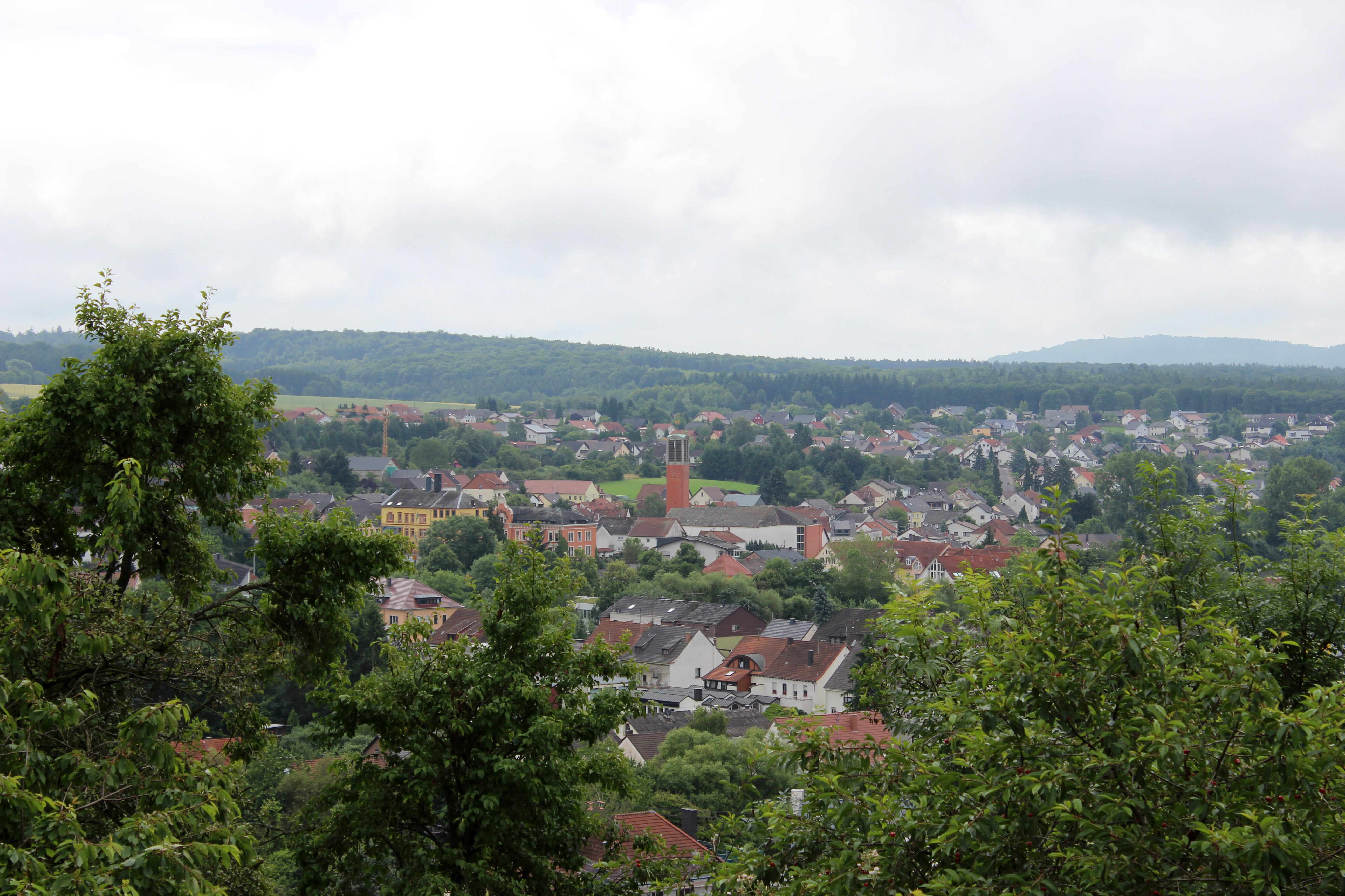 Blick vom Himmelberg auf Schmelz, Lamdkreis Saarlouis, Saarland